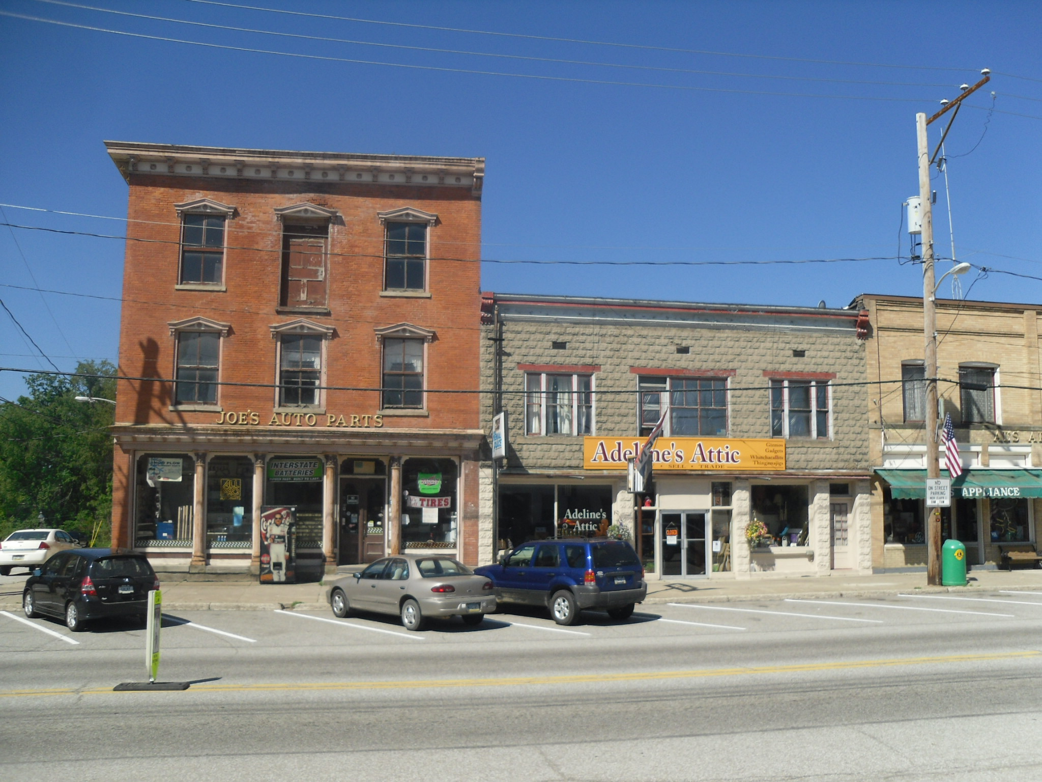 Waterford, Pennsylvania